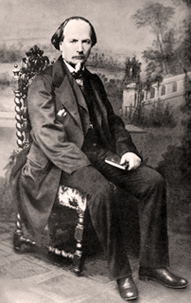 Placide Cappeau, poète anticlérical, rédacteur de Minuit Chrétiens